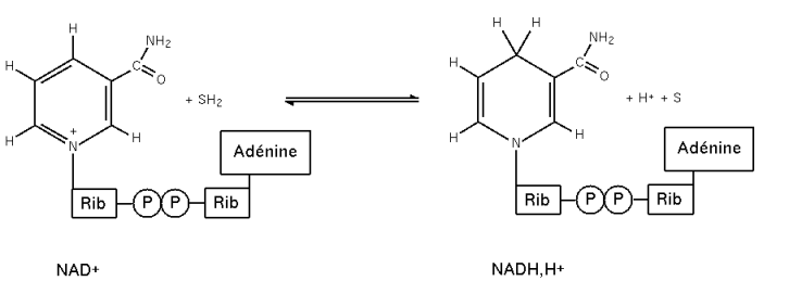 Réaction d'oxydoréduction du Nicotinamide adénine dinucléotide. Avril 2005 Création personnelle. Symboles : NAD : Nicotinamide adénine dinucléotide (forme oxydée) ; NADH : Nicotinamide adénine dinucléotide (forme réduite) ; P : Groupement phosphate ; Rib : β-D-Ribofuranose (ribose)